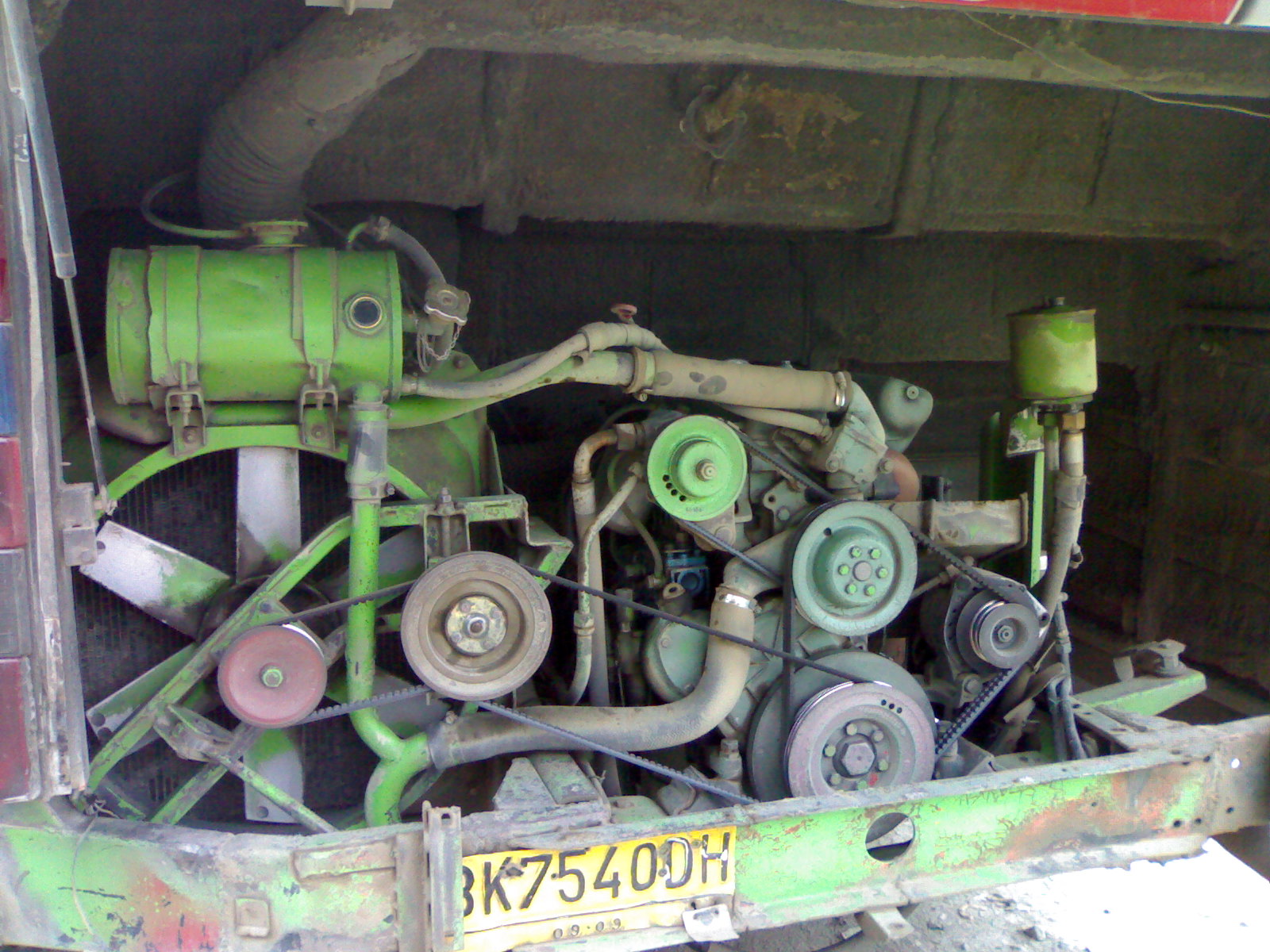 Salah satu mesin bus Mercedes Benz seri OH.